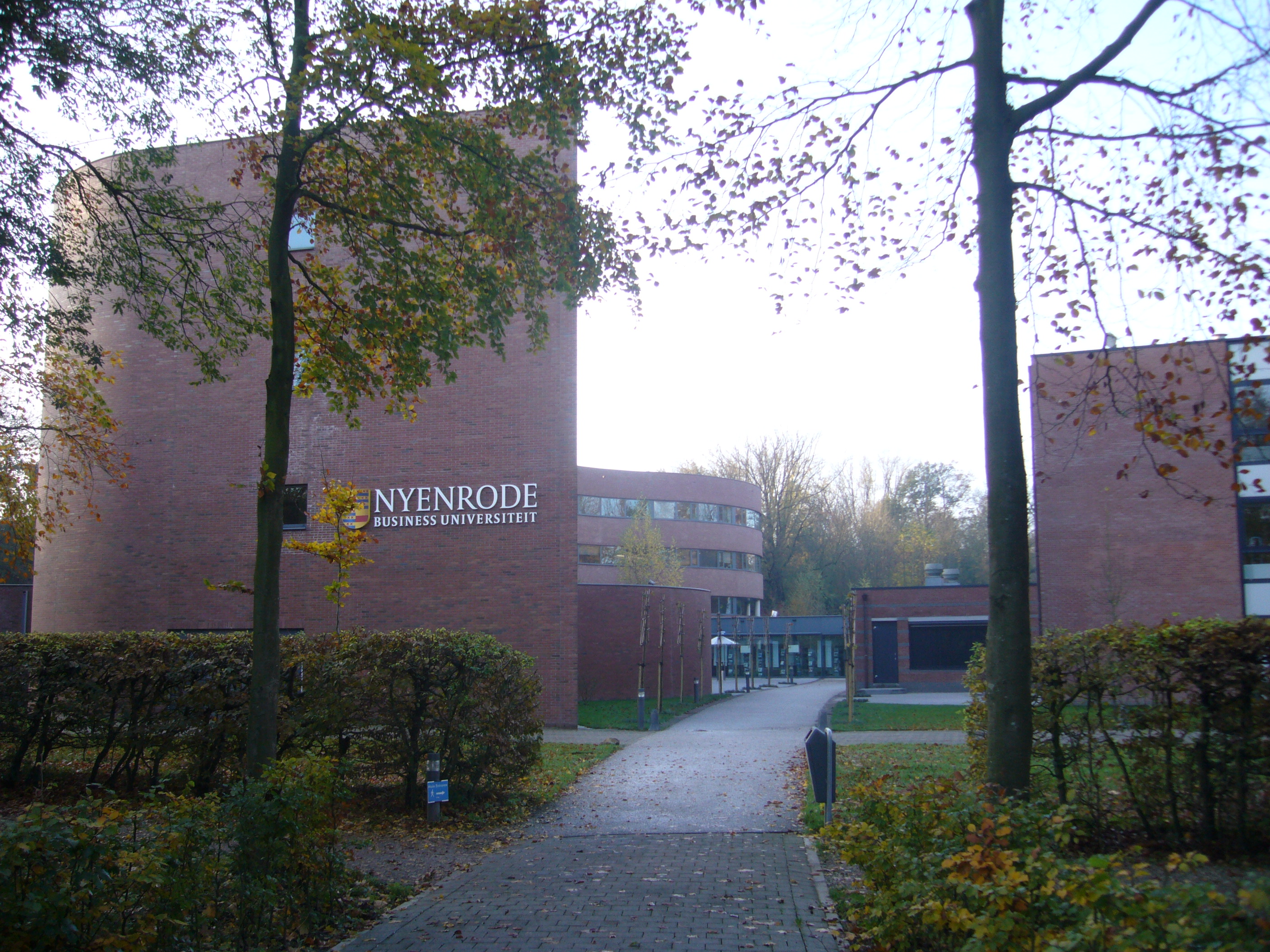 Nyenrode Business Universiteit, Dr Albert Heijn gebouw